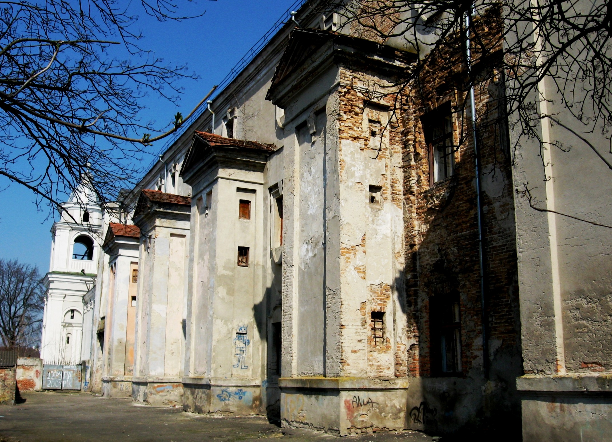 Луцьк. Мури єзуїтського колегіуму